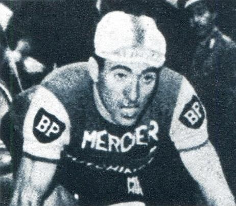 Valentin Huot, 'Sprint 73', Panini figurina n°156.